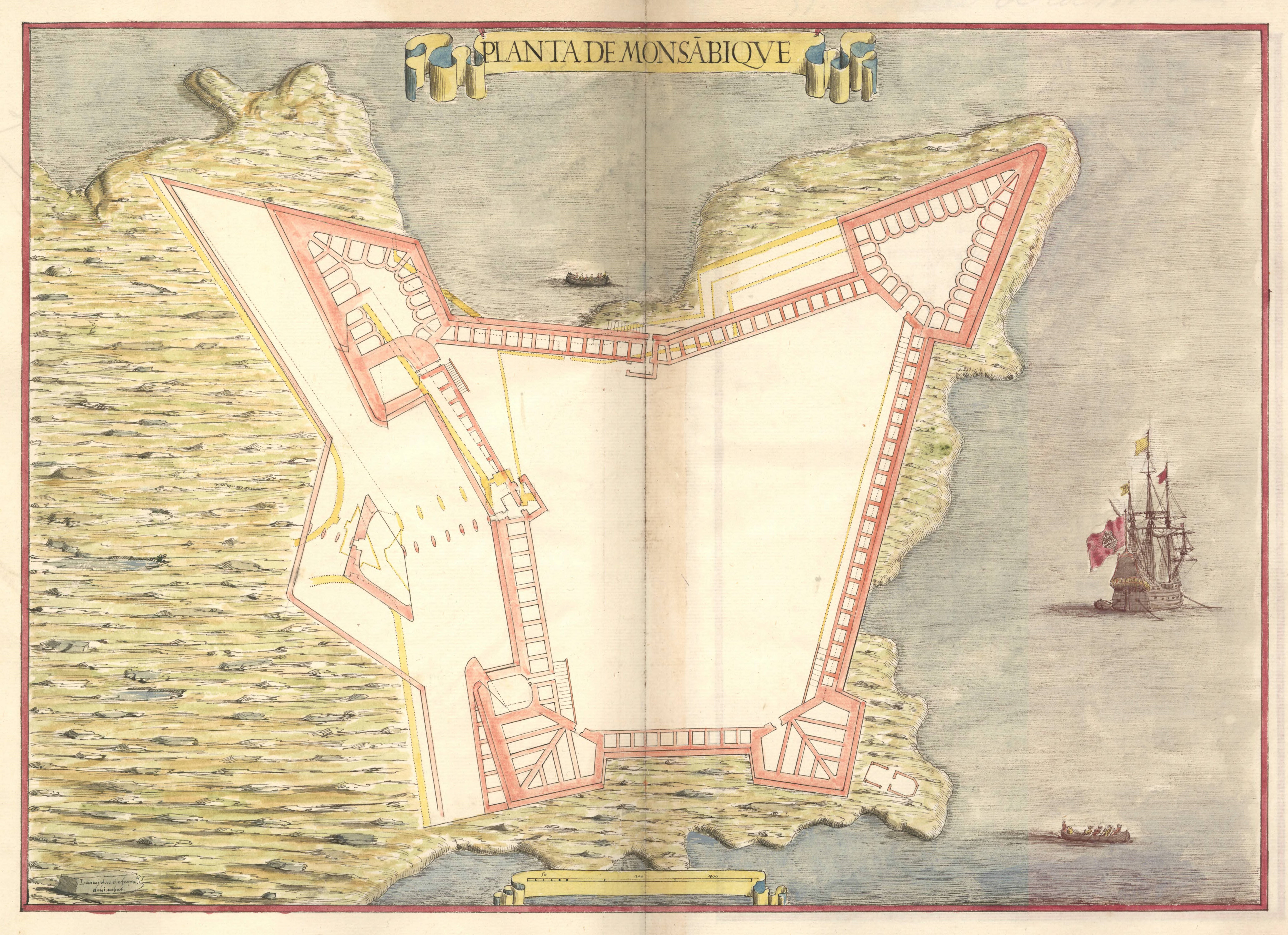 Planta de Mosanbique. Fortaleza de São Sebastião da Ilha de Moçambique, Moçambique. Planta aguarelada. Atlas de Leonardo de Ferrari, 1655. Arquivo Militar de Estocolmo, Krigsarkivet, (Handritade Kartverk, cota 51-36 1655), Suécia. Publicada por Rocío Sánchez Rubio, Isabel Testón Núñez e Carlos M. Sánchez Rúbio em Imagens de un Imperio perdido. El Atlas del marques de Heliche. Plantas de diferentes Plazas de España, Italia, Flandres y Las Indias, La memoria ausente. Cartografia de España y Portugal en el Archivo Militar de Estocolmo. Siglos XVII y XVIII, Badajoz, 4 Gatos, 2006, Espanha.